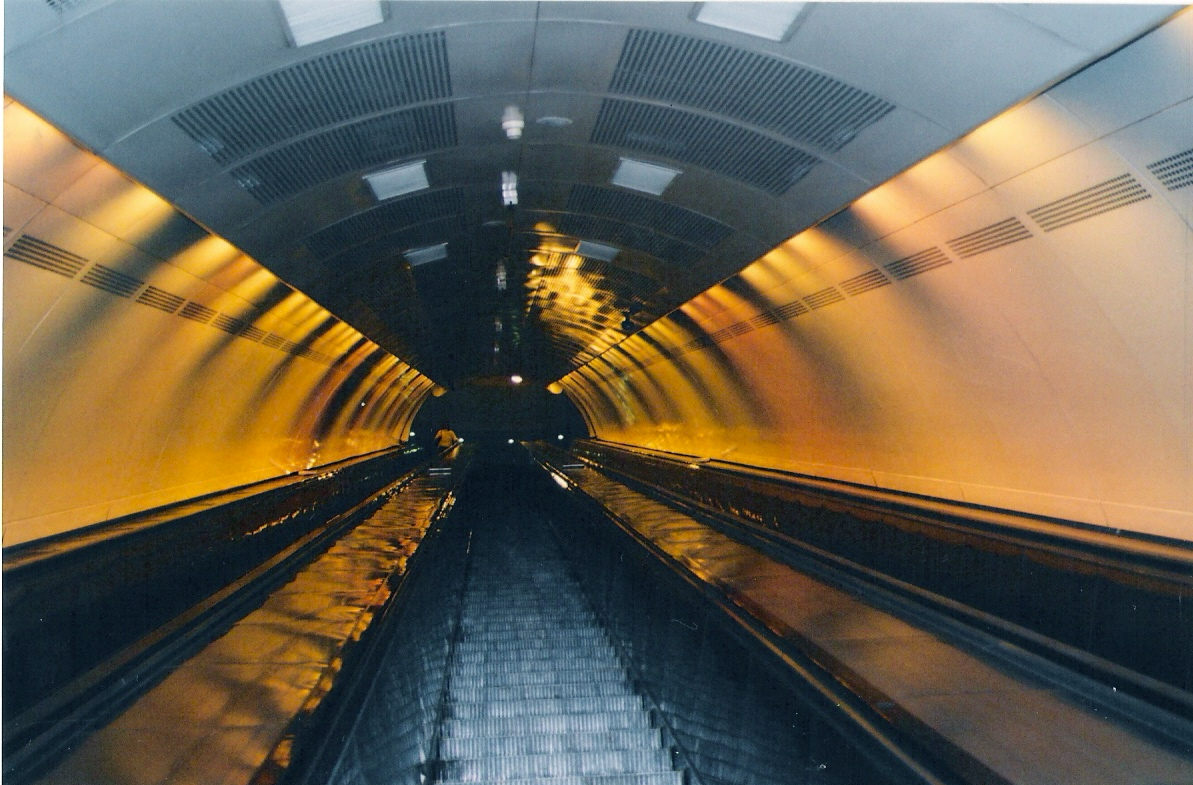 Степенице према Вуковој станици.